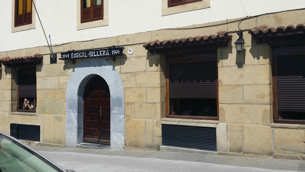 Euskal Bilera elkartea